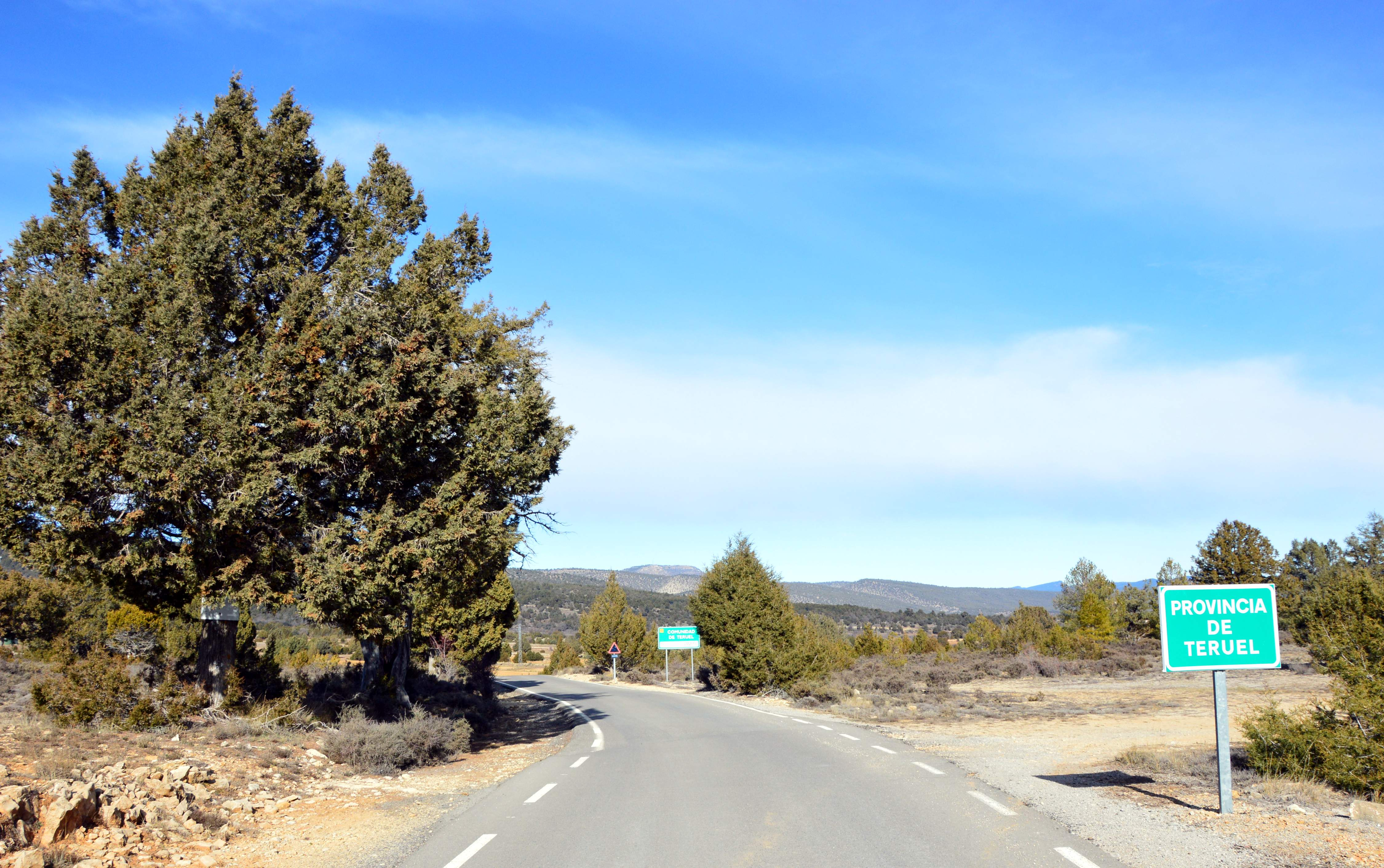 Detalle de la carretera de Veguillas de la Sierra (Teruel), a la entrada de la provincia de Teruel (2017).